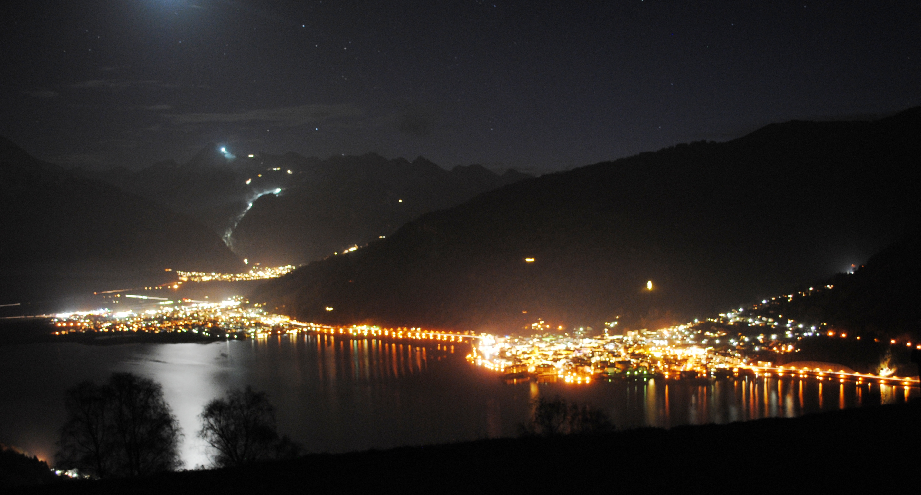 Zell am See bei Nacht